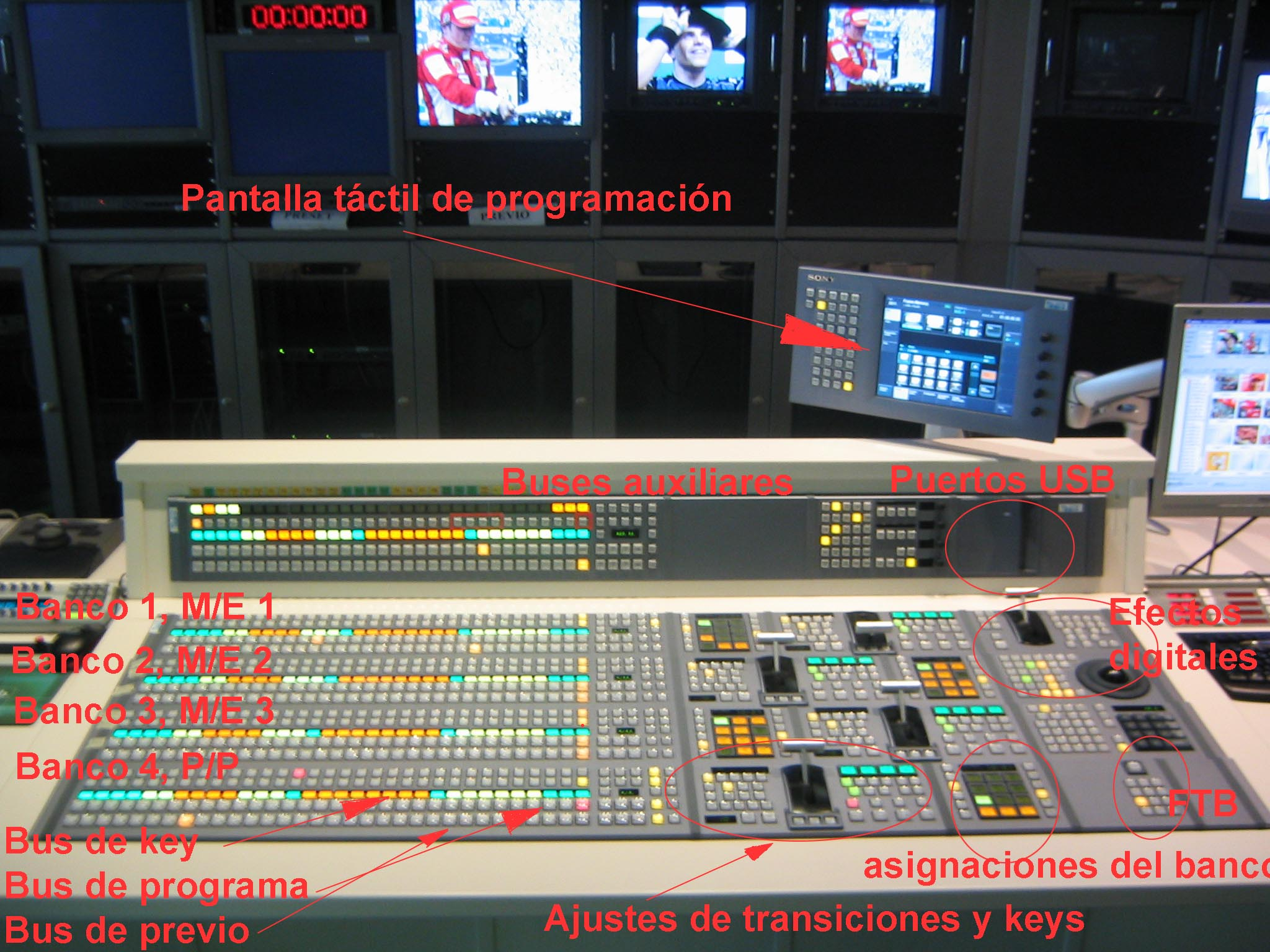 Consola de una mesa de vídeo Sony donde se indican las diferentes partes.